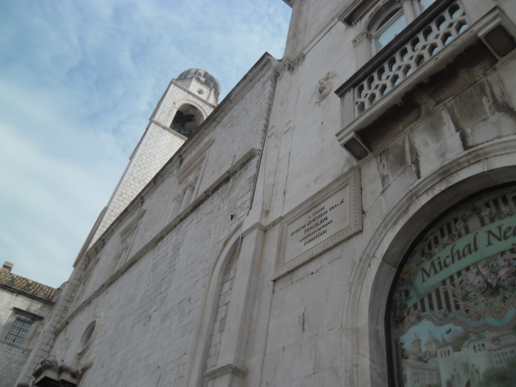 spomen-ploča hrvatskom kralju Tomislavu u Dubrovniku